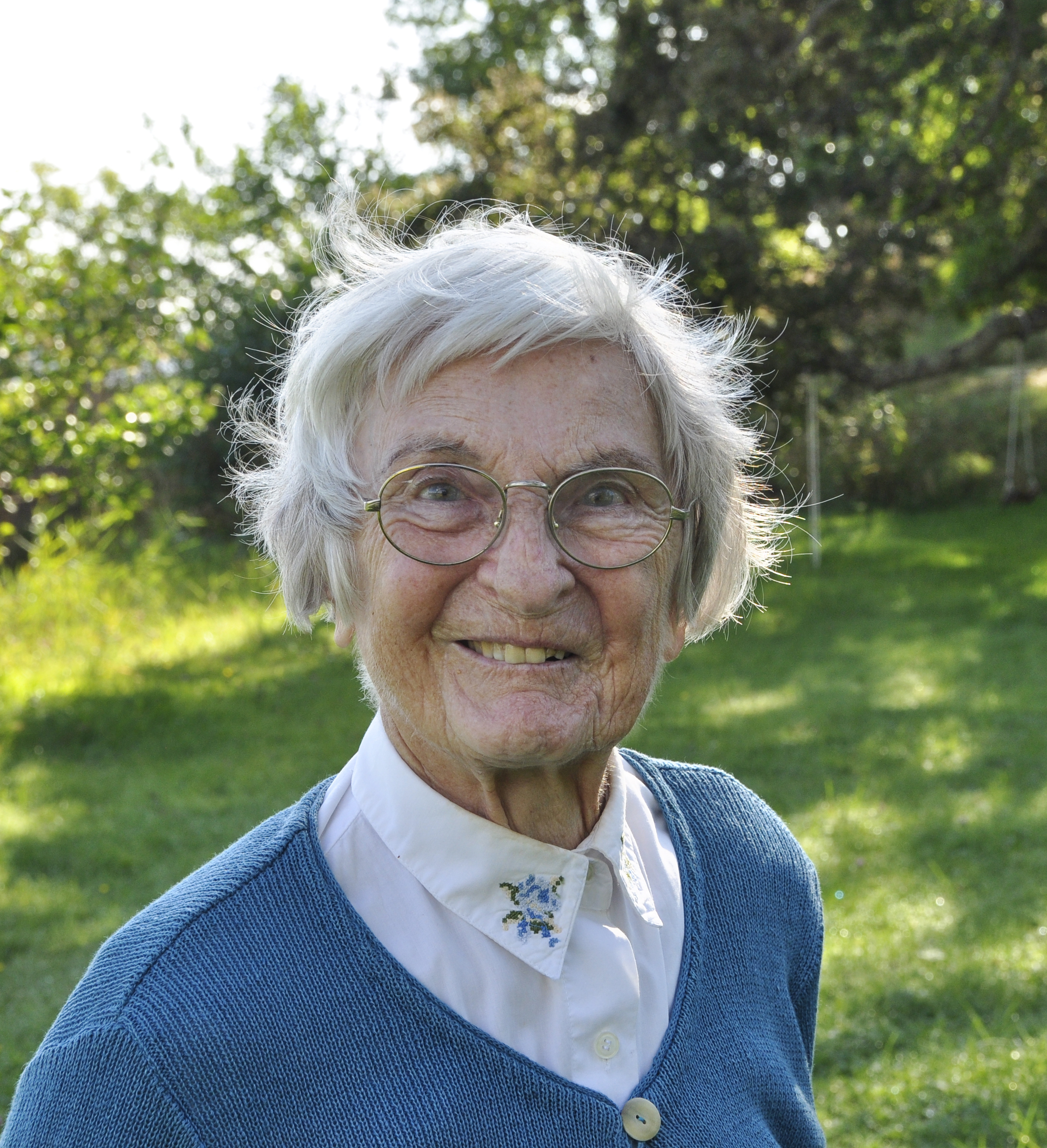 Strindbergsförfattaren Alice Rasmussen 2014